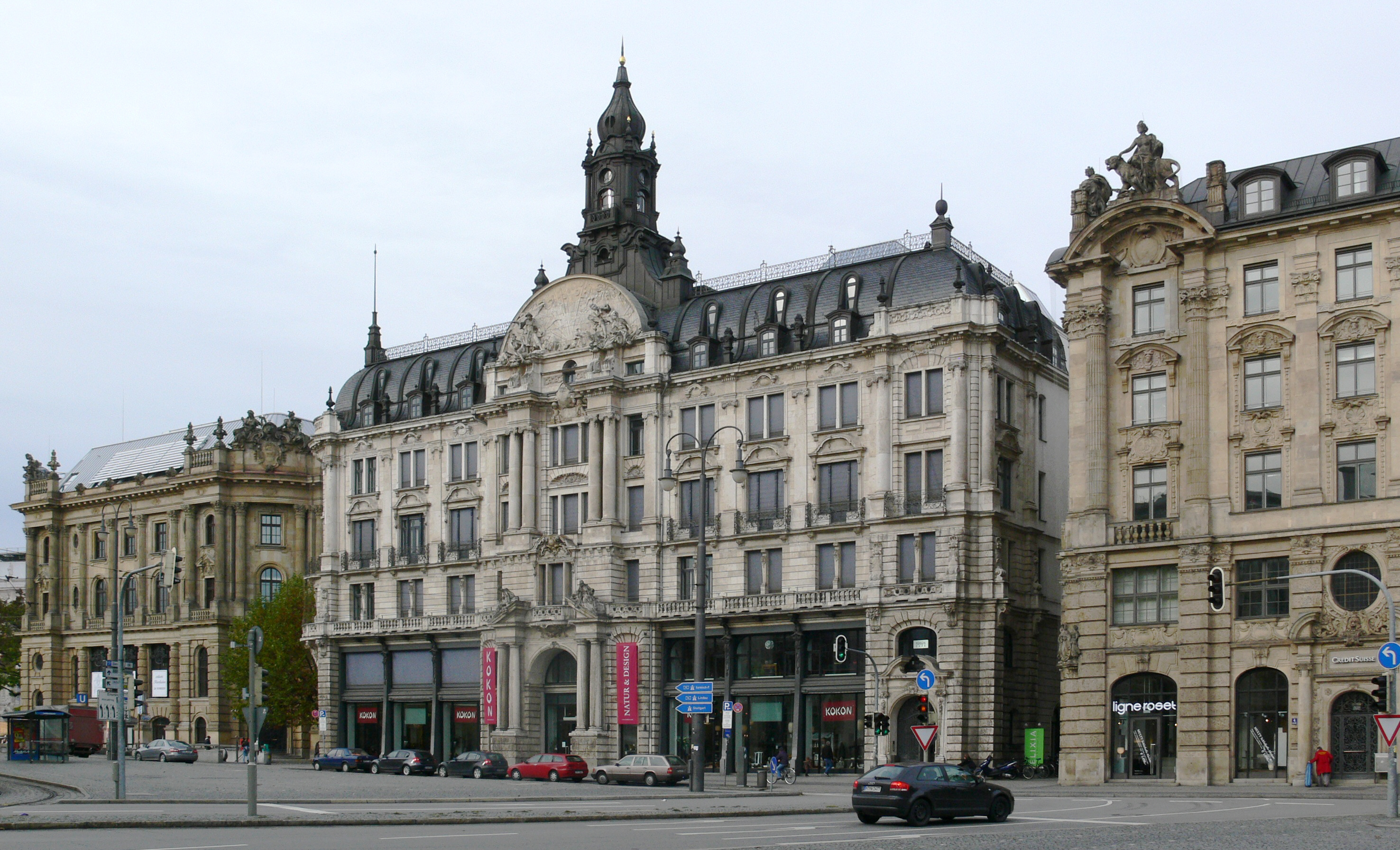 Haus Bernheimer, Lenbachplatz 3, München